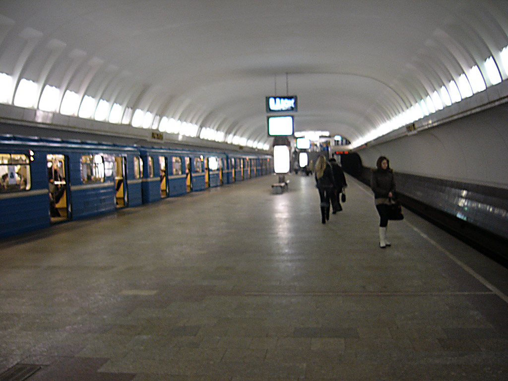 Metro station Vostok (Восток, Усхо́д) in Minsk, Belarus